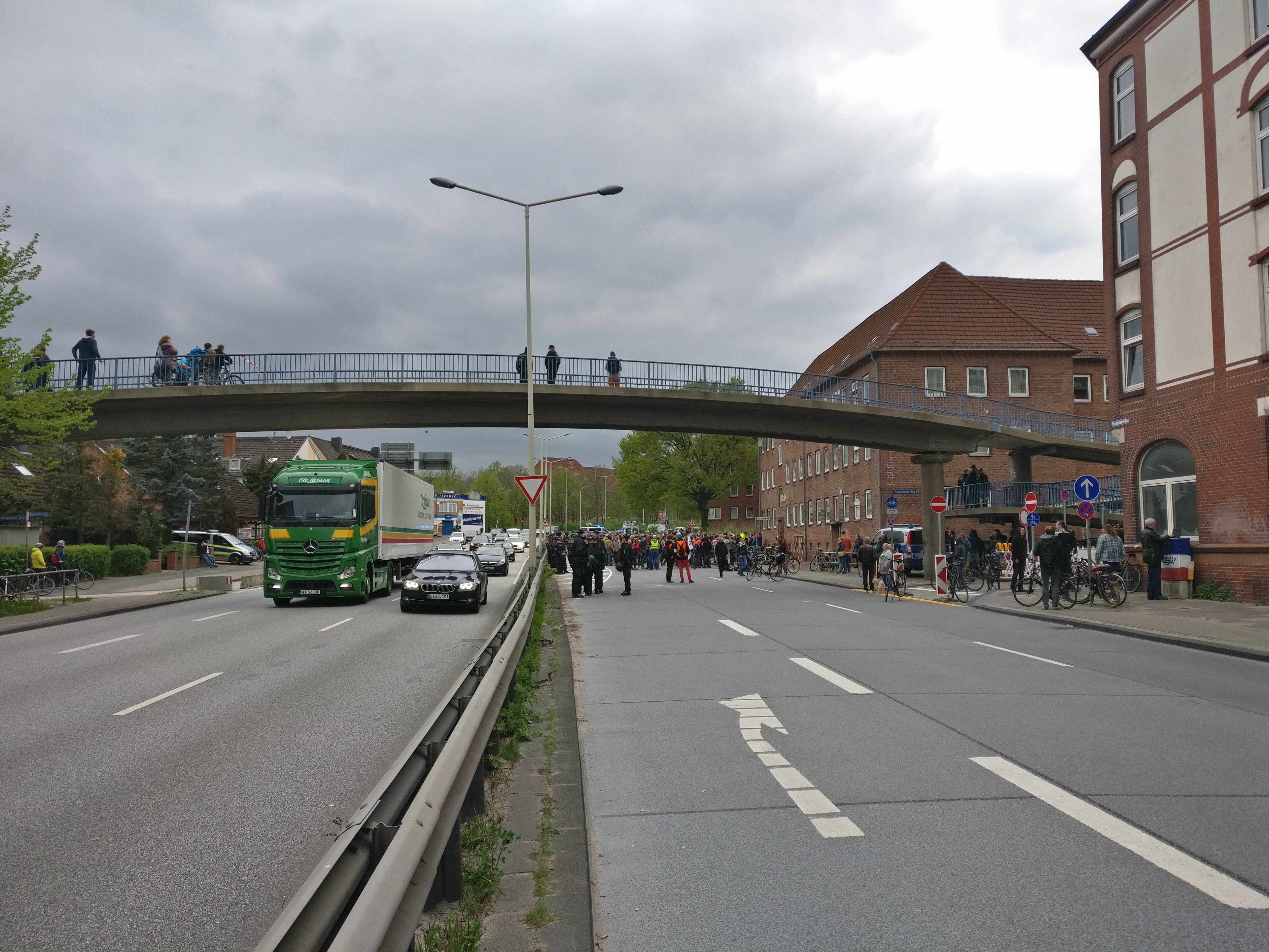 Blick auf die Demonstration der TurboKlimaKampfGruppe Kiel (TKKG) am 26.04.2019 auf dem Theodor-Heuss-Ring.